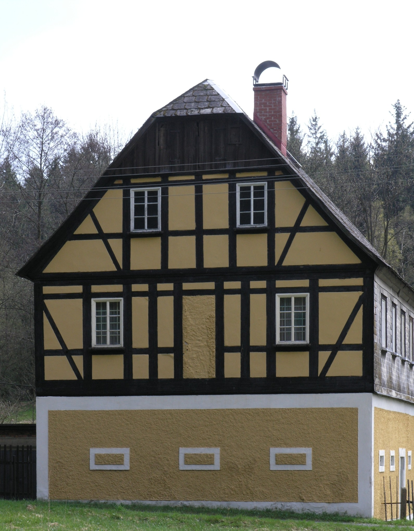 Štít domu s hrázděným patrem, čp. 237 v Brtníkách